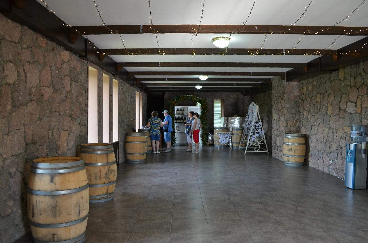 Экскурсия в Шато-Эркен и Нальчик, 27.06.2019